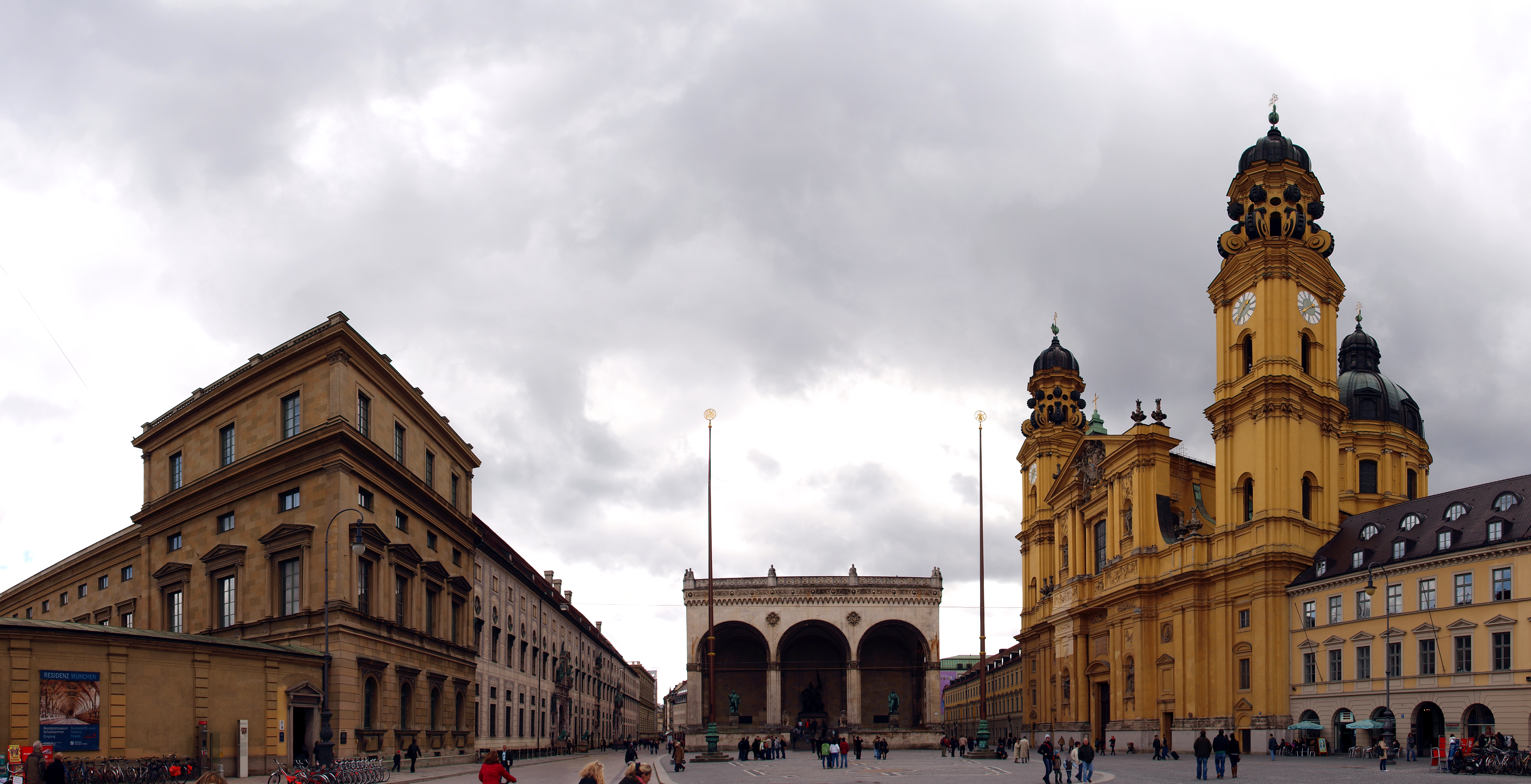 Odeonsplatz in München (Munich), Germany